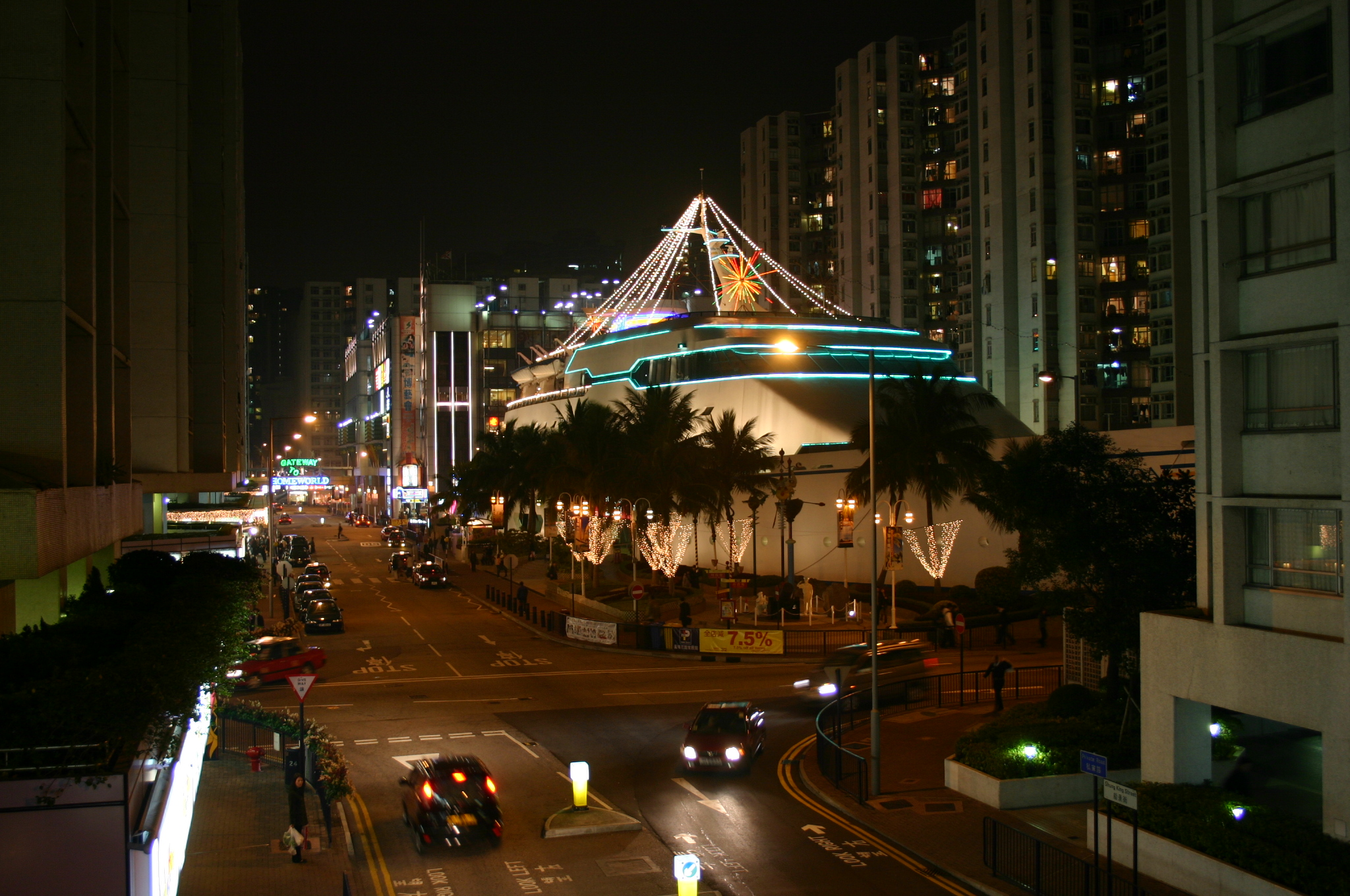 Whampoa Garden, Hunghom, Hong Kong